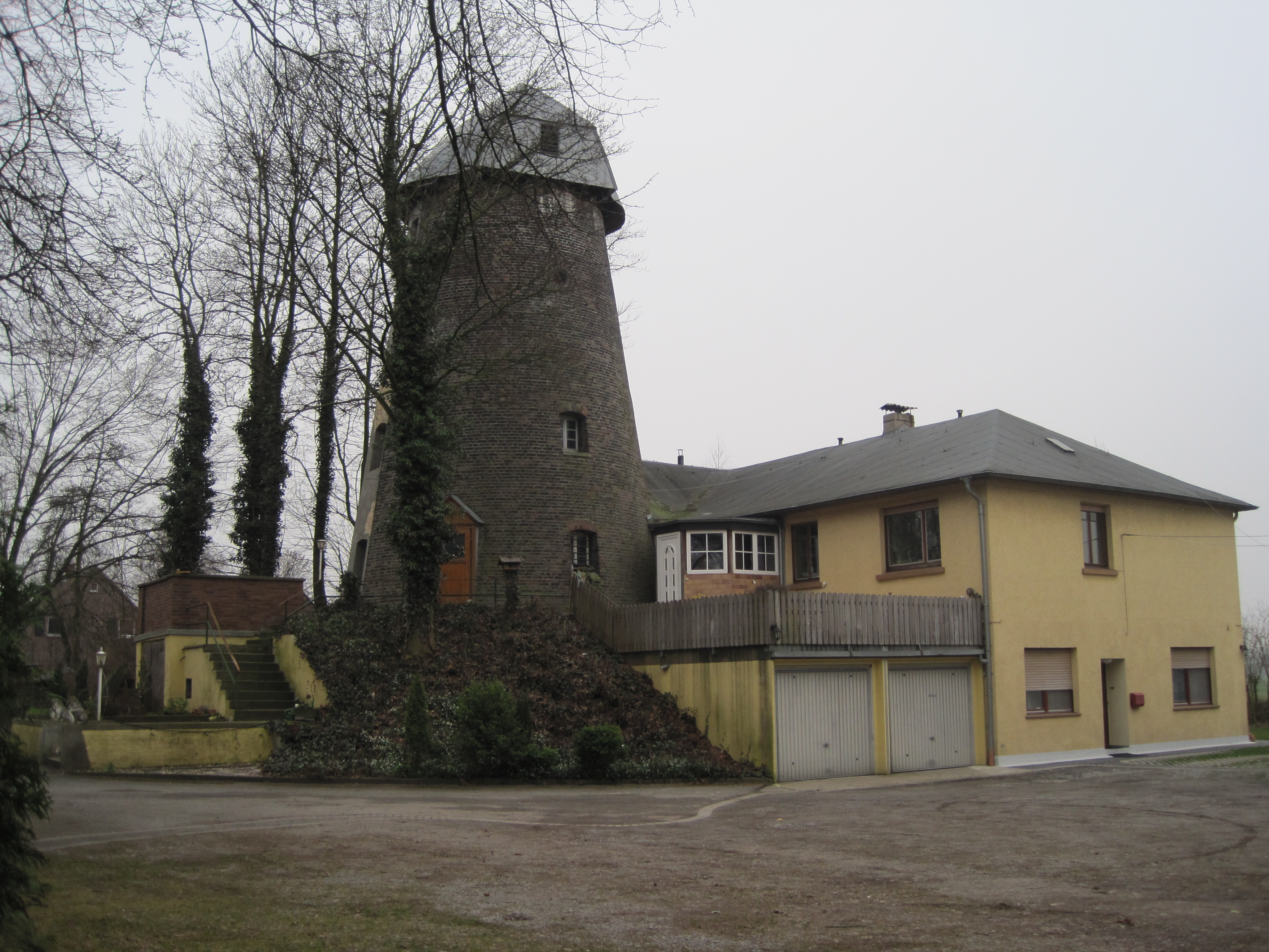 Das Foto zeigt die Klostermühle in Hamm-Bockum-Hövel.